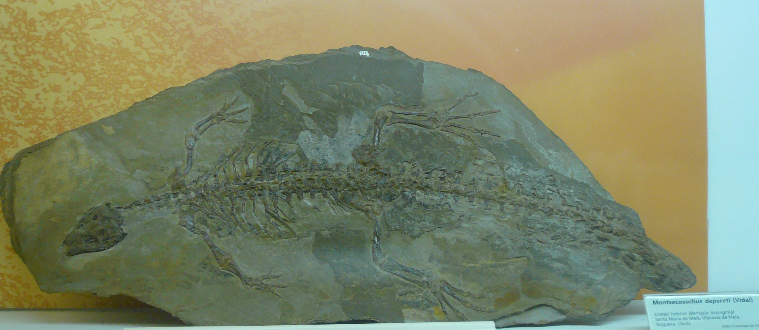 Fòssil de Montsecosuchus depereti exposat al Museu de Geologia de Barcelona (Museu Martorell); ara deu ser al Museu Blau. Segons la descripció del mateix museu, va ser trobat per Lluís Maria Vidal el 1902.